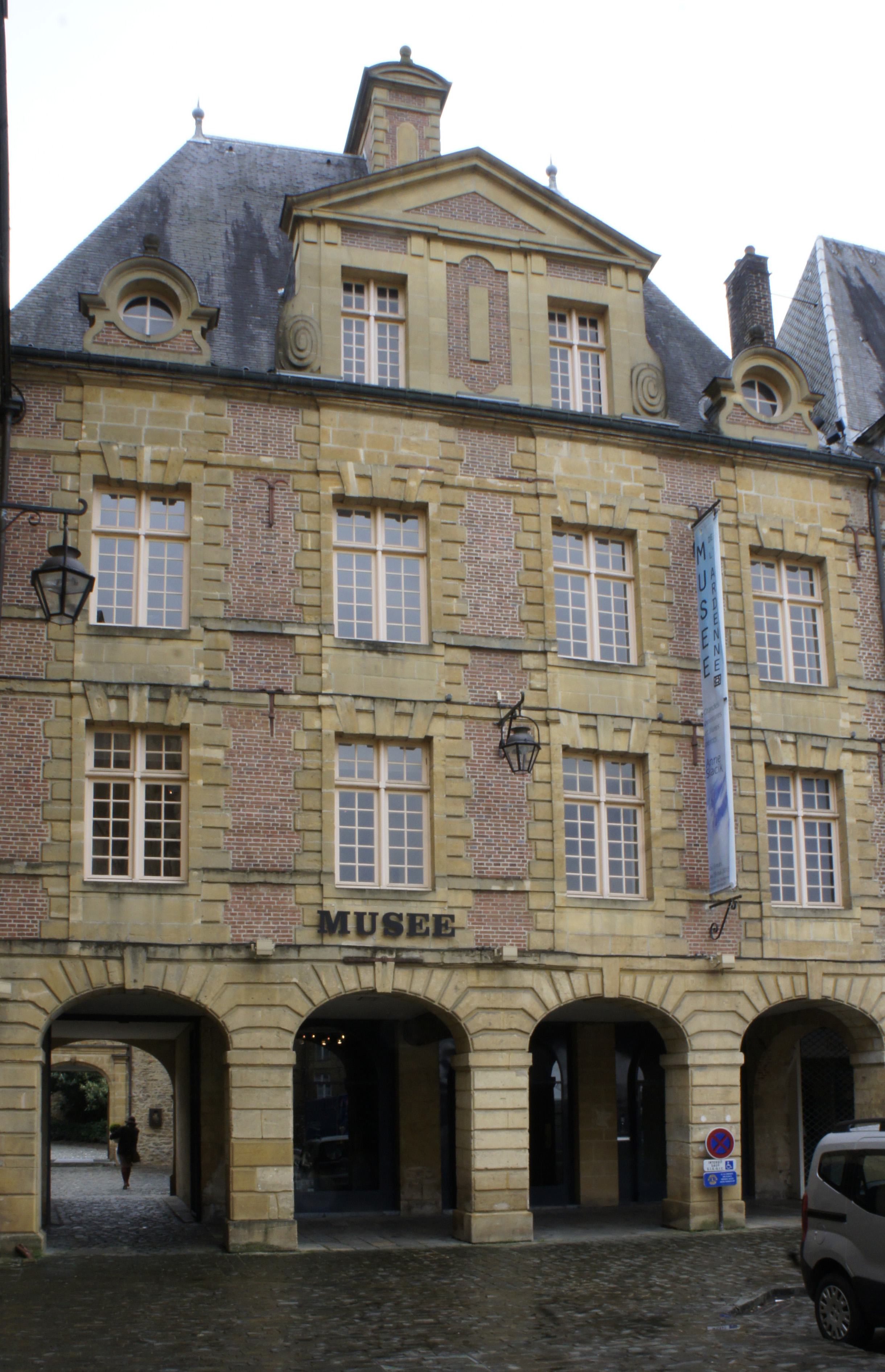 Entrée du musée sur la place ducale .